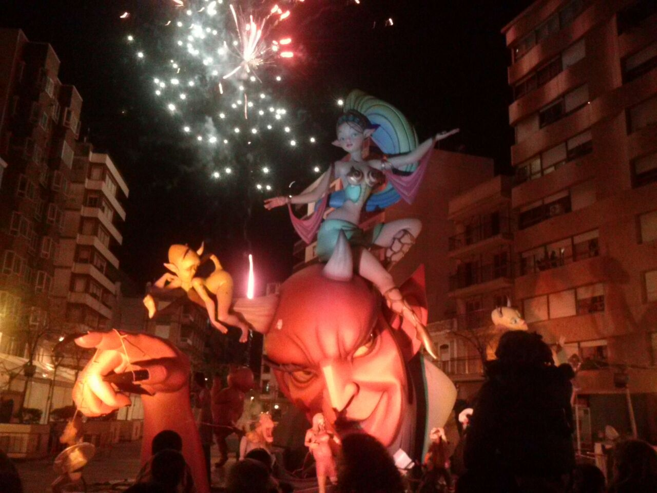 Cremà del monument gran en la nit de Sant Josep